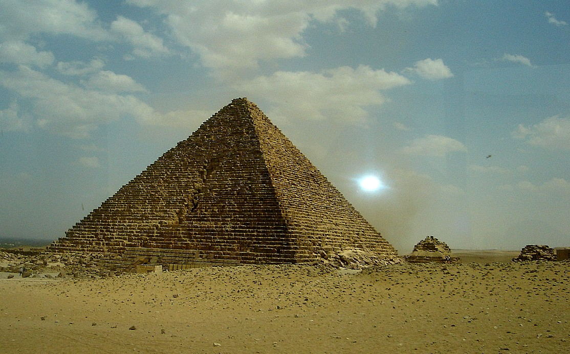 Immagine dall'Egitto Mykerinos